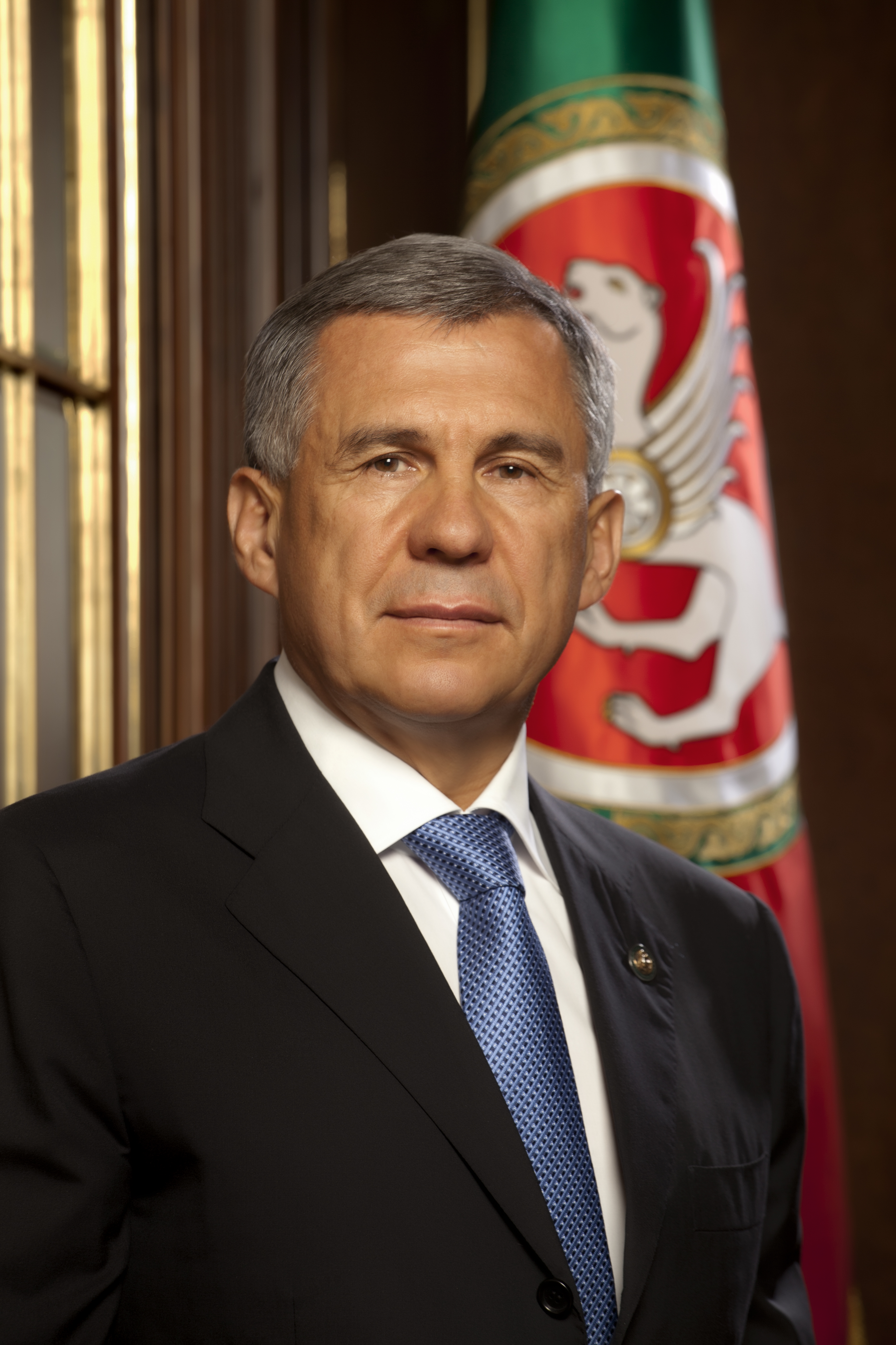 Президент Республики Татарстан Р.Н. Минниханов